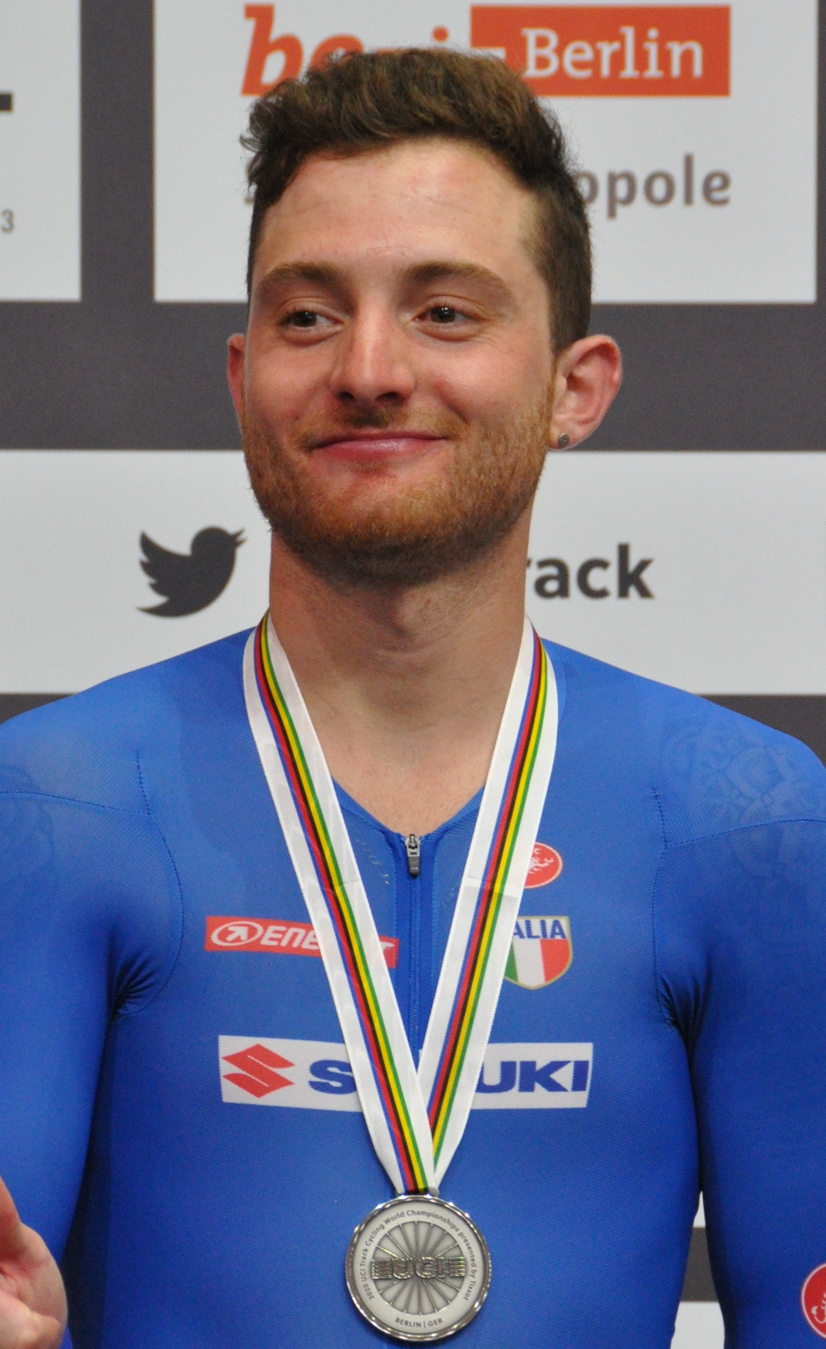 Simone Consonni, italienischer Radsportler - Silber im Scratch